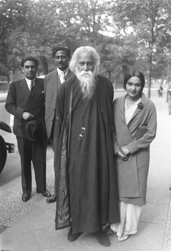 Rabindranath Tagore, der indische Dichter-Philosoph, 70 Jahre alt! Der bekannte indische Dichter Rabindranath Tagere, welcher am 6. Mai seinen 70. Geburtstag feiert.